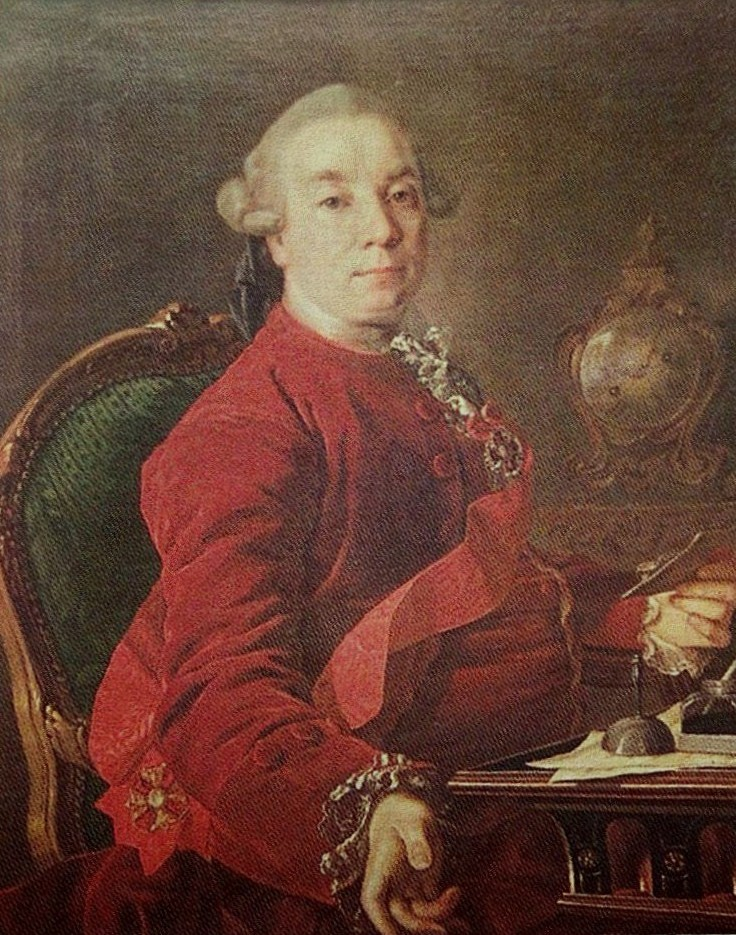 Григорий Николаевич Теплов